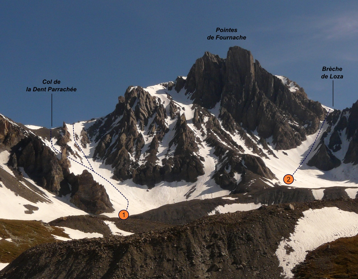 descrizione della via di salita alla Dent Parrachèe